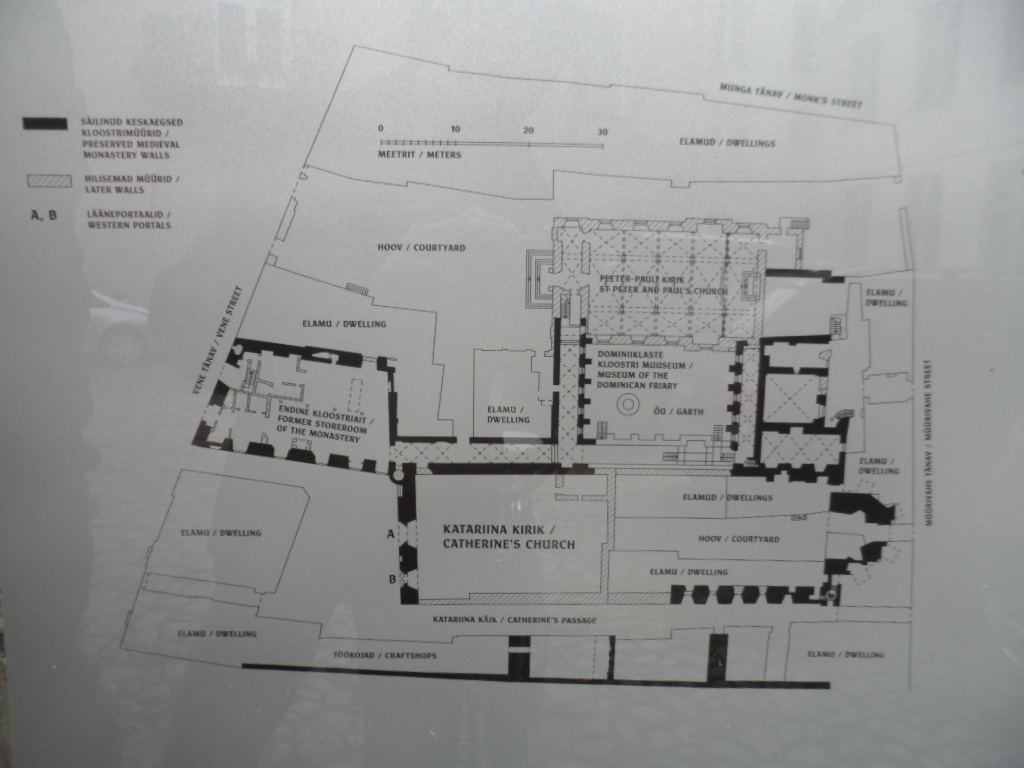 схема монастыря